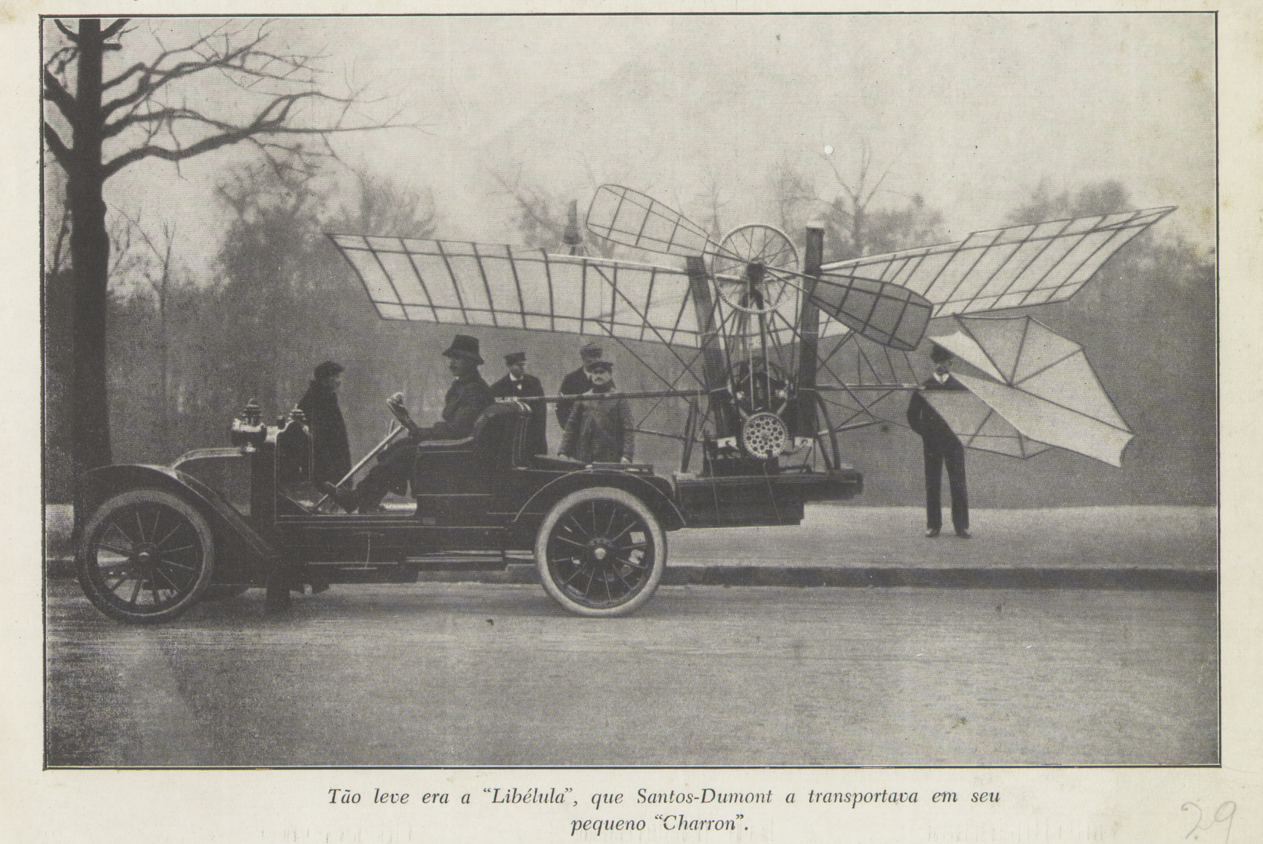 Obra que integra o acervo do Museu Paulista da USP. Coleção Alberto Santos Dumont.